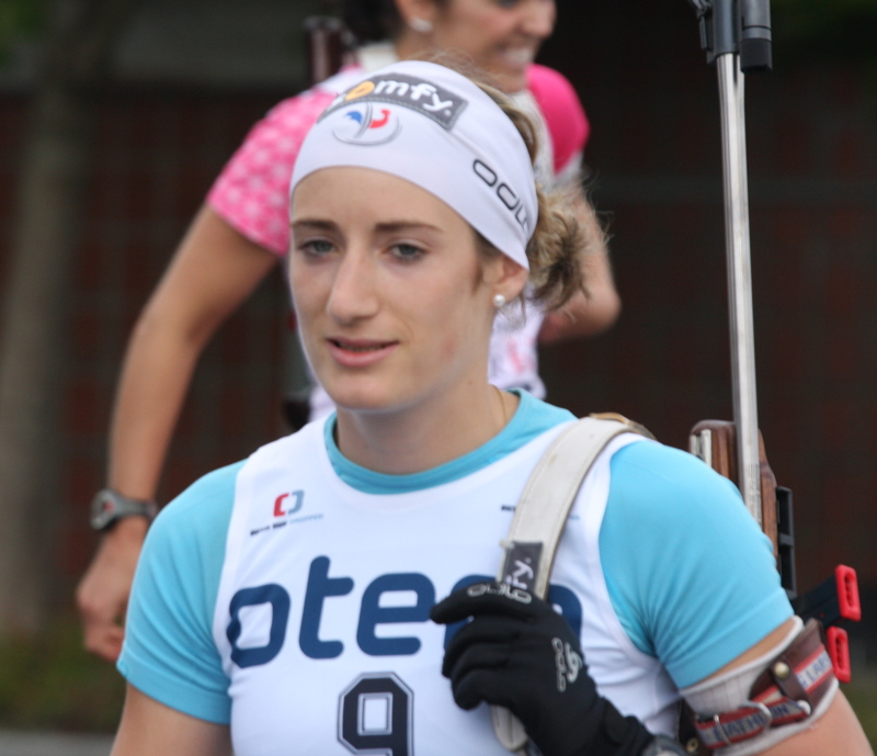 Marie-Laure Brunet under Blinkfestivalen i Sandnes 2009